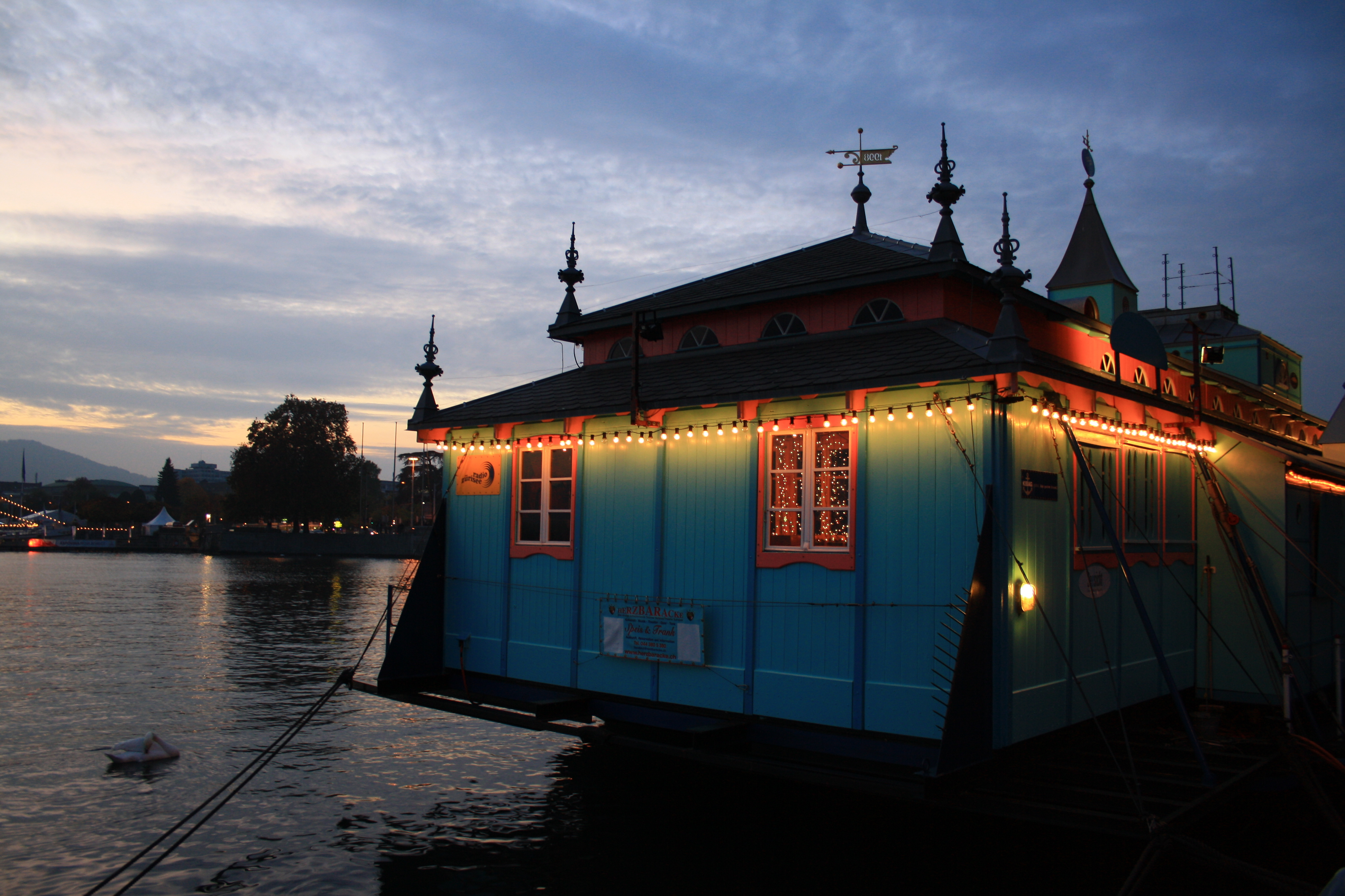 Theater Herzbaracke on Zürichsee (Lake Zürich) at Bellevue in Zürich (Switzerland), Bürkliplatz and General-Guisan-Quai to the left.